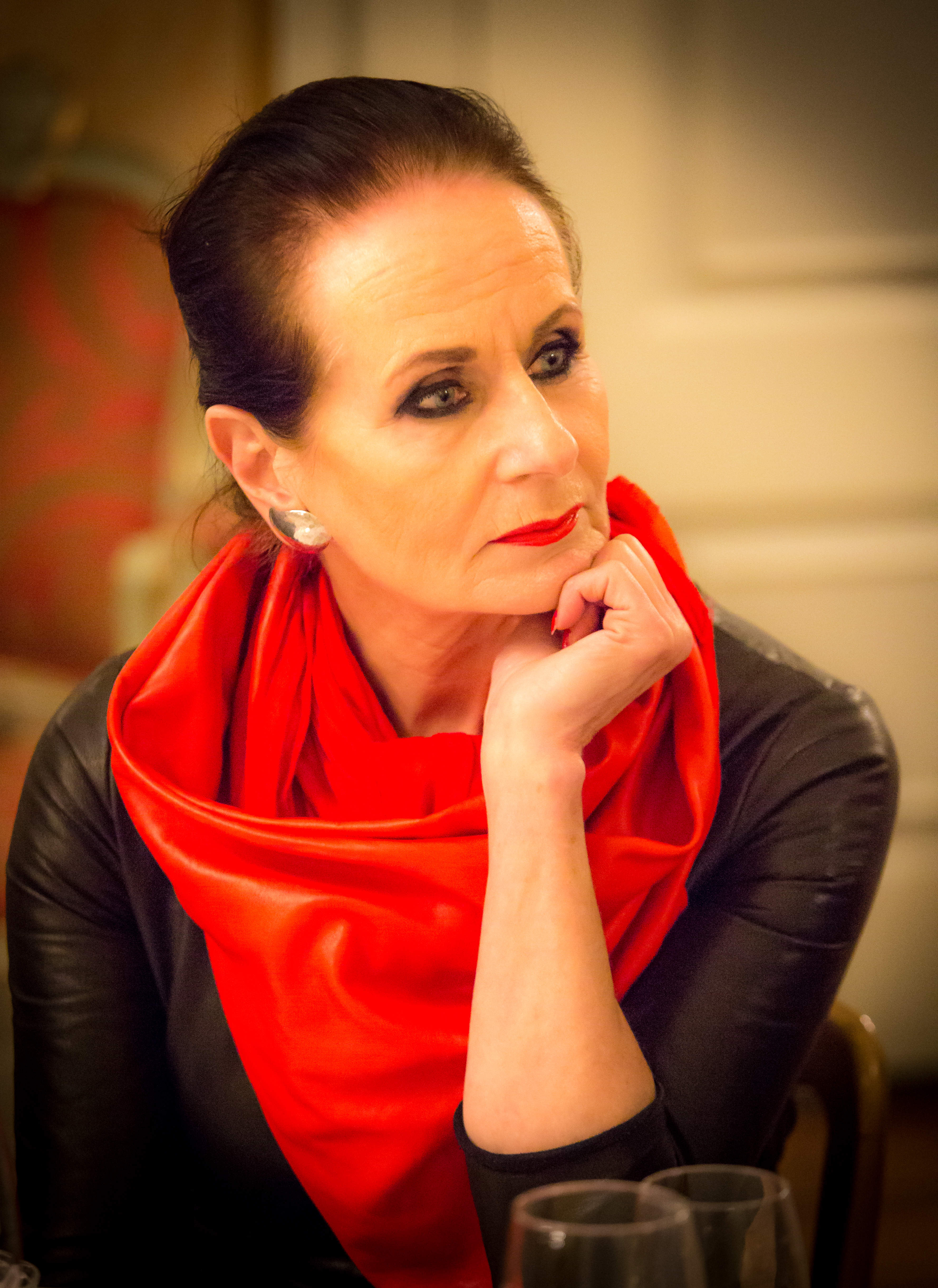 Ans Markus